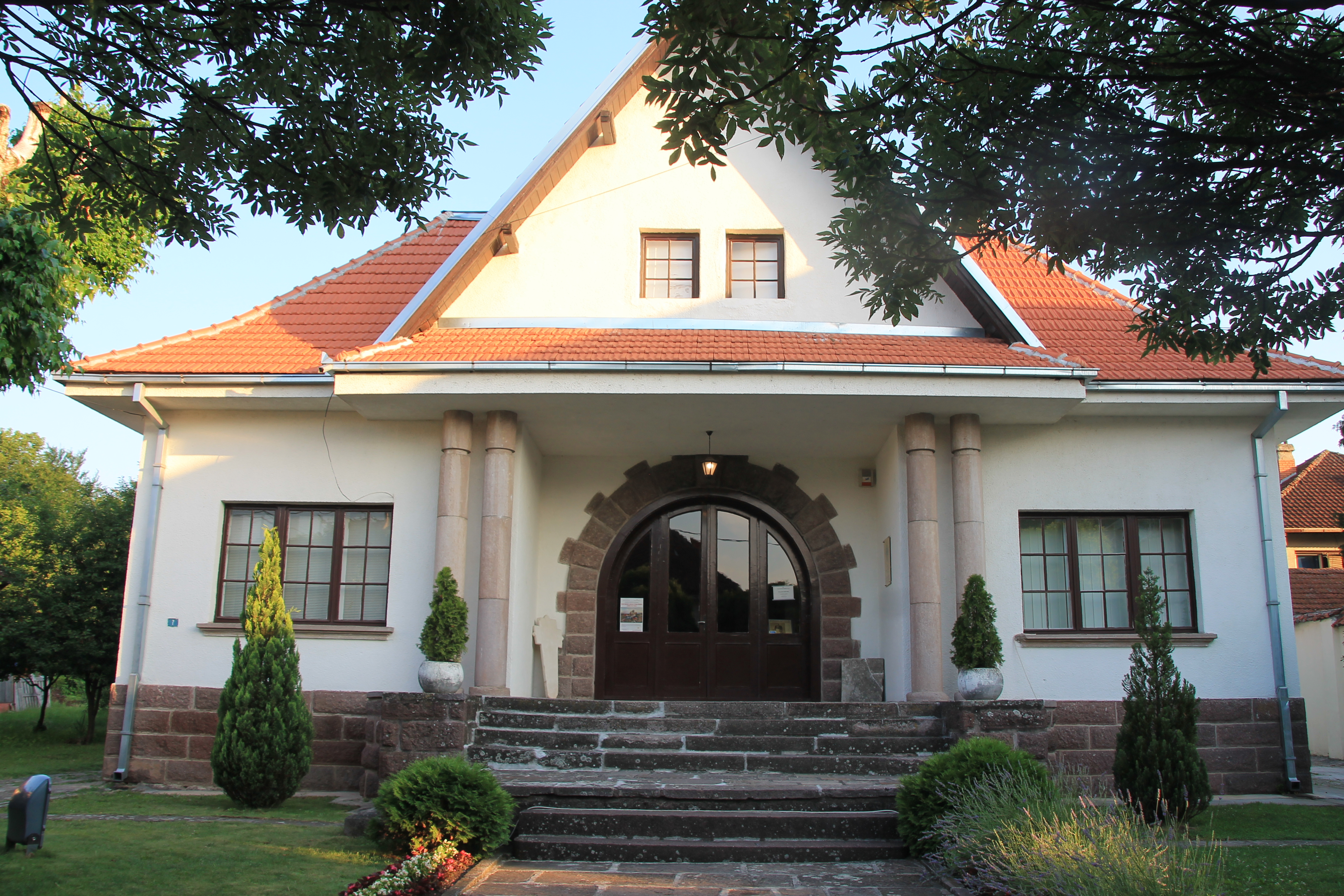 Muzej rudničko-takovskog kraja